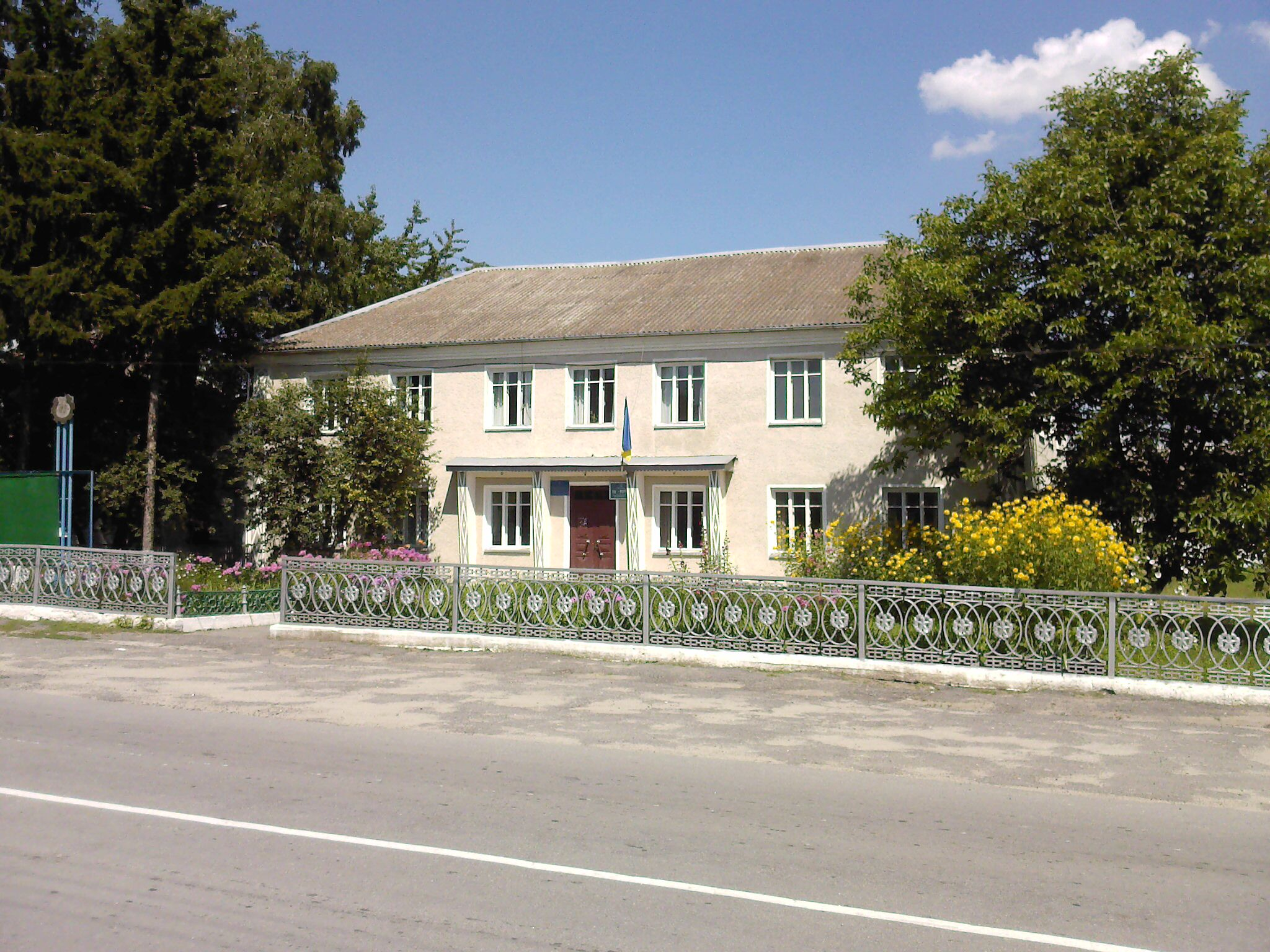 Будівля Базалійської селищної ради